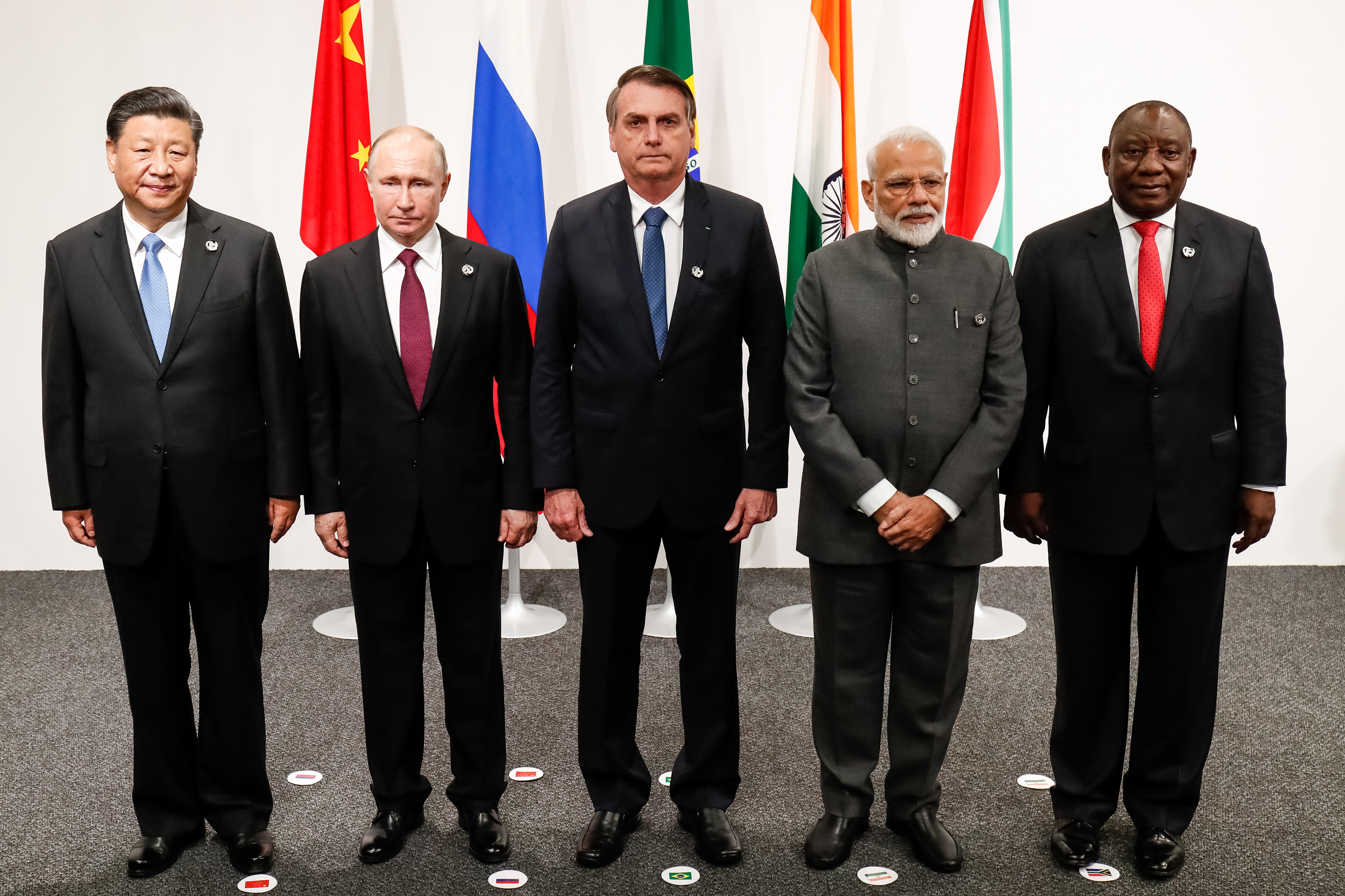 (Osaka - Japão, 28/06/2019) Presidente da República, Jair Bolsonaro, durante foto de família dos Líderes do BRICS. Foto: Alan Santos/PR